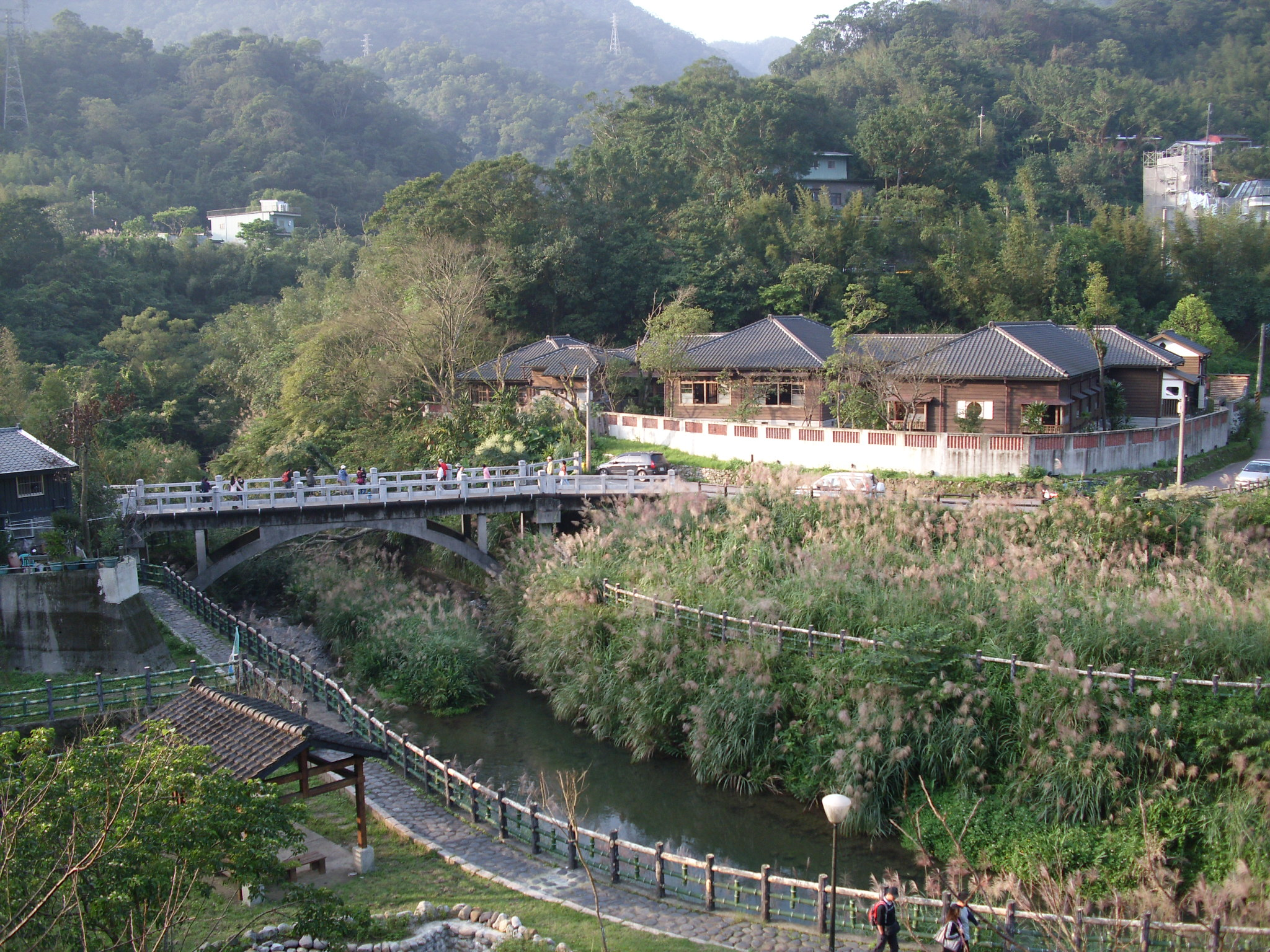 Bân-lâm-gú: 佇臺灣新北市平溪區菁桐的民生橋、真樸齋。